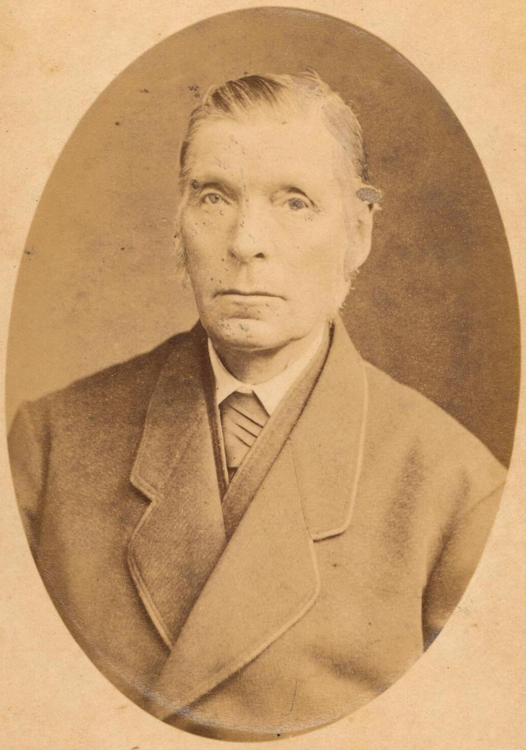 Portret van Klaas Breebaart, dijkgraaf, polderbestuurder en lid Provinciale Staten van Noord-Holland